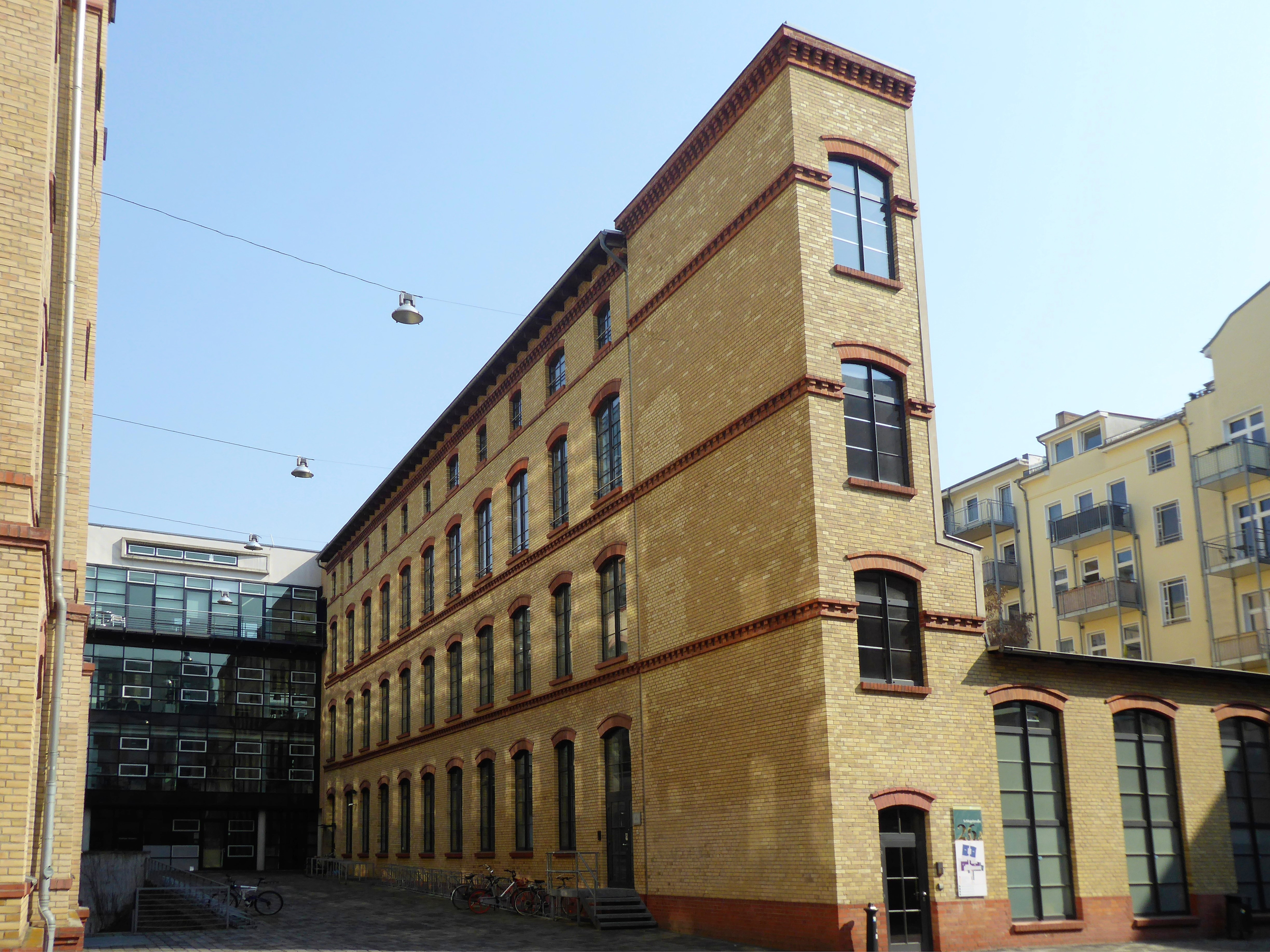 Mitte Invalidenstraße 116 Edison-Höfe